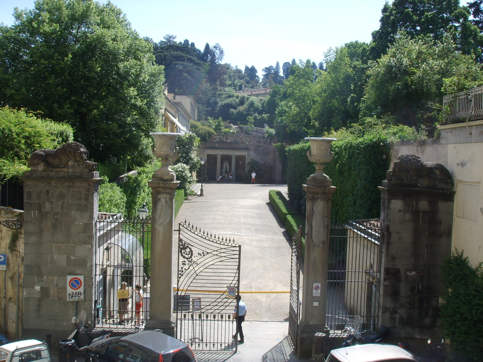 see fileneme